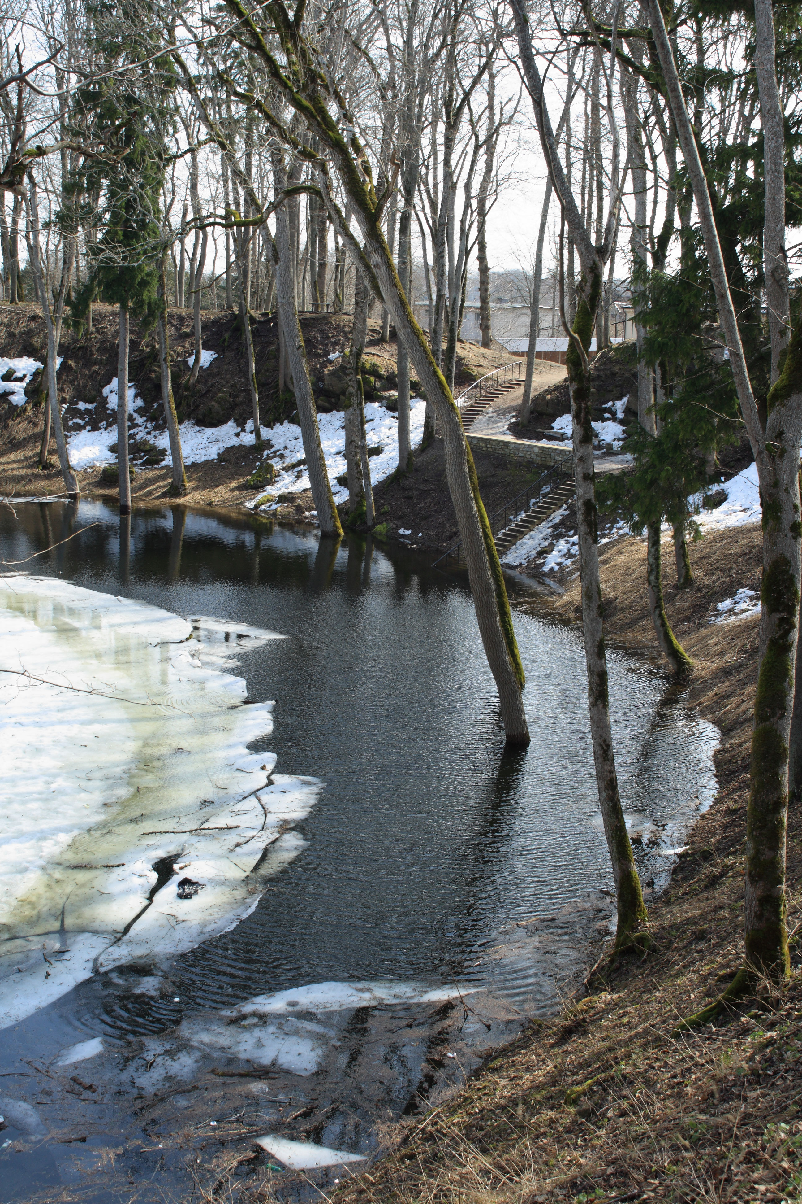 Kaali kraater kevadise suurvee ajal